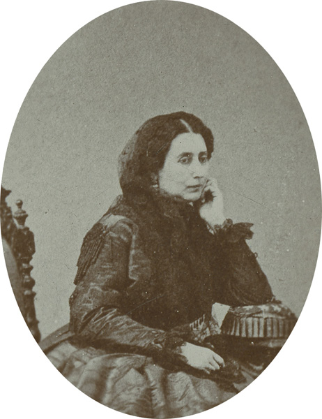 Copia positiva. Carolina Coronado.